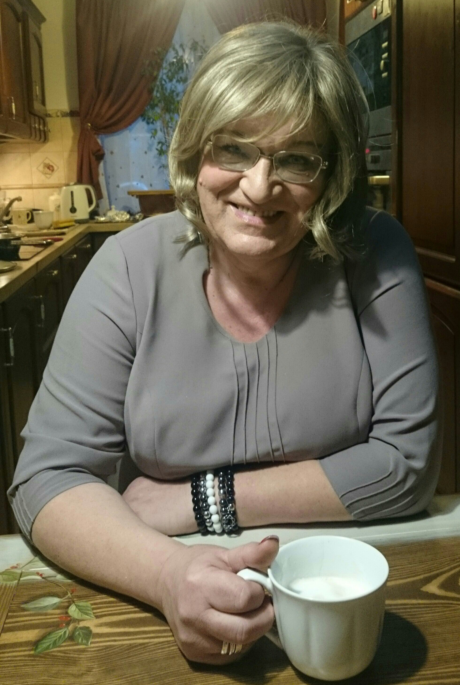 Grudzień 2014